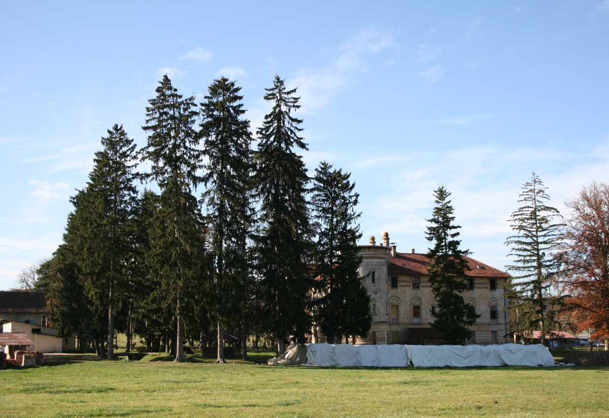 Utvrda/samostan Lovrečina grad